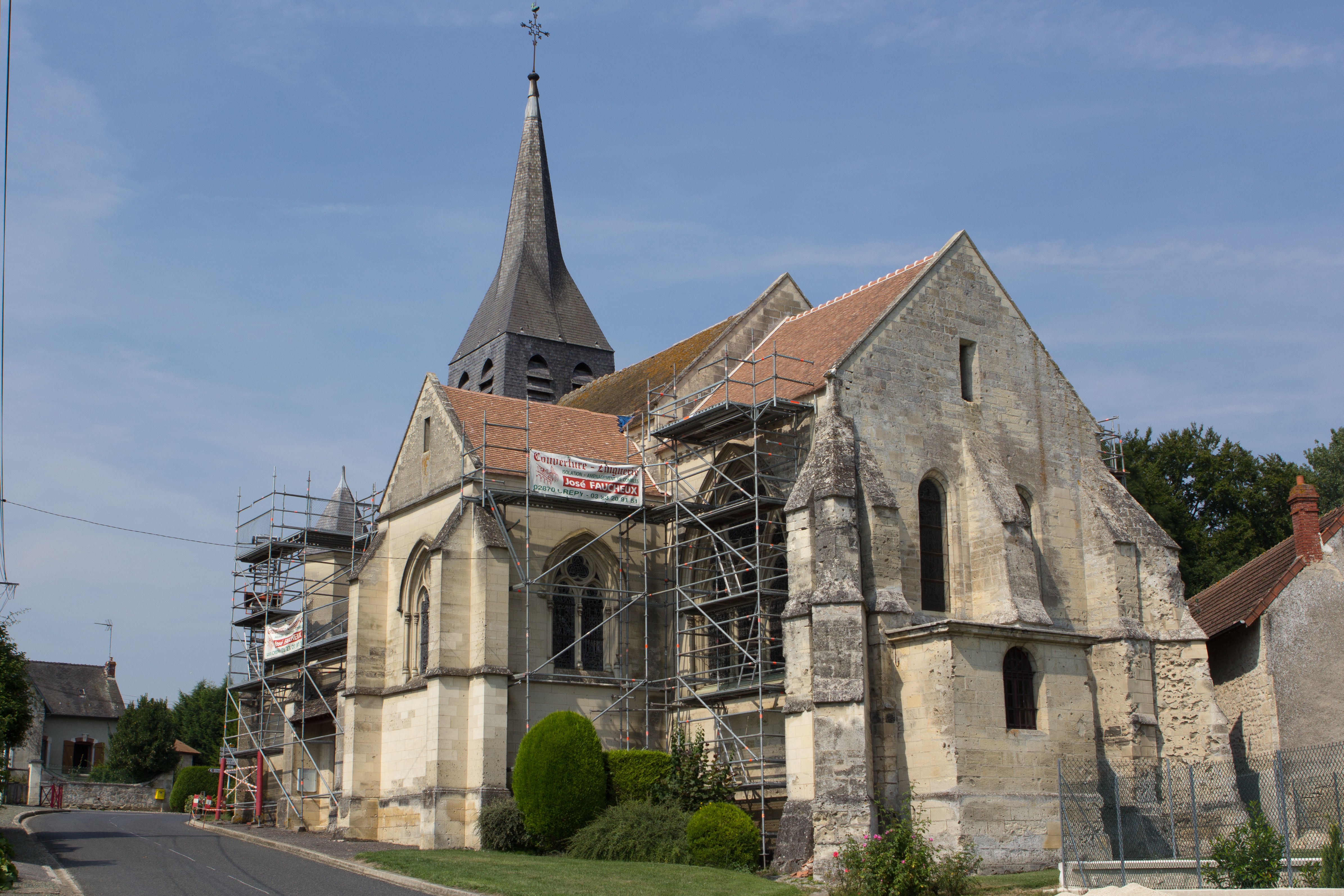 Église Saint-Jean-Baptiste de Pancy-Courtecon, Pancy-Courtecon, Aisne, France